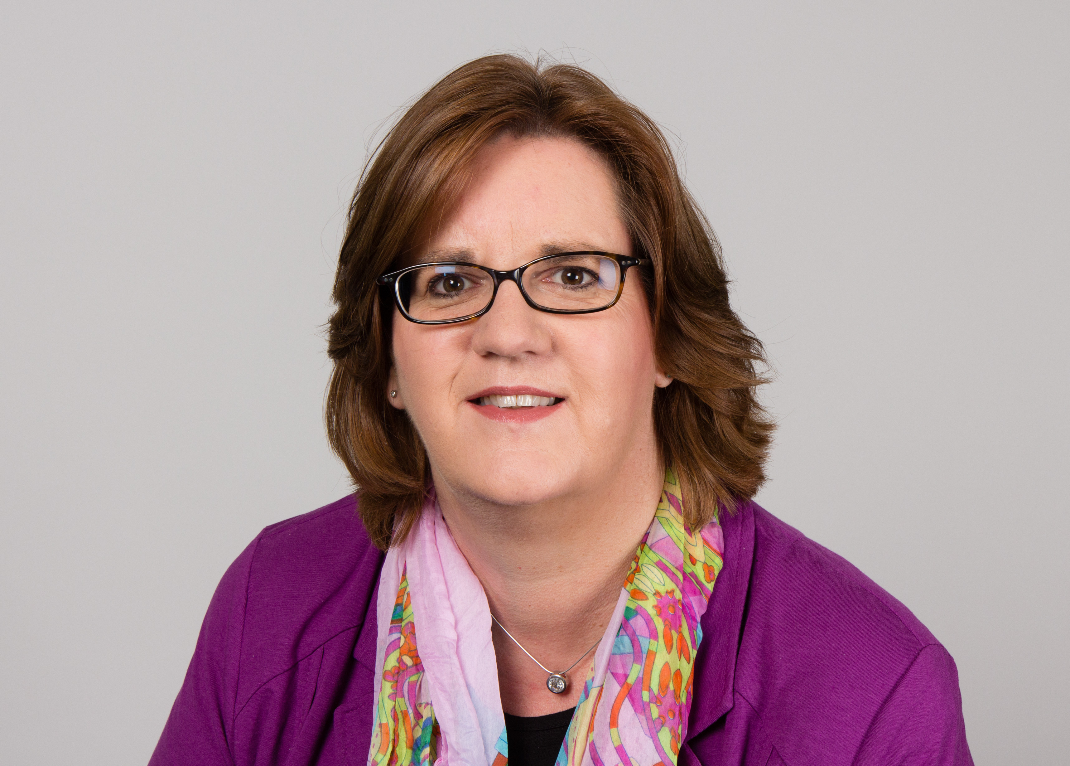 Kerstin Griese (* 6. Dezember 1966 in Münster) ist eine deutsche Politikerin (SPD). Die Ratingerin ist Mitglied des Deutschen Bundestages und Vorsitzende des Ausschusses für Arbeit und Soziales. Wikipedia-Bundestagsprojekt 2014 8–12 September 2014 in BerlinThis file was taken during the project “Wiki loves parliaments/Bundestag 2014” (German). Organisation: Martin Rulsch, Olaf KosinskyDesign: Martin KraftPhotography: Foto-AG Gymnasium Melle (Jan-Kristof Blömke, Lukas Eismann, Moritz Kosinsky, Laura Lessing, Karsten Mosebach, Mascha Mosebach, Teresa Schreer, Noah Sewöster, Niklas Tschöpe), Olaf Kosinsky, Martin Kraft, Harald Krichel, Steffen Prößdorf, Ralf Roletschek, Martin Rulsch, Gerd Seidel, Sven TeschkeVideo: Marc Rudnick, Manuel SchneiderEditors: Marcus Cyron, Günter Fremuth, Martin Kraft, Robin Krahl, Harald Krichel, Martin Rulsch, WikiAnikaReception: DasMonstaaa, Leonie Rabea Große, Lutheraner, Nina Möllering, Martin Rulsch, WikiAnika, Foto-AG Gymnasium MelleCosmetics: Regina Bosak, Bettina Dieguez, Sandra Kobbe, Andrea Strehlke; Irada Abdullayeva, Vivien Abelmann, Olena Engelbrecht, Sarah Fabini, Nina Magnus, Jacqueline Schmidt, Leonie Taboada, Julia Willer Usage information If you need more information how to use this file, please send an email to . Personality rights warningAlthough this work is freely licensed or in the public domain, the person(s) shown may have rights that legally restrict certain re-uses unless those depicted consent to such uses. In these cases, a model release or other evidence of consent could protect you from infringement claims.